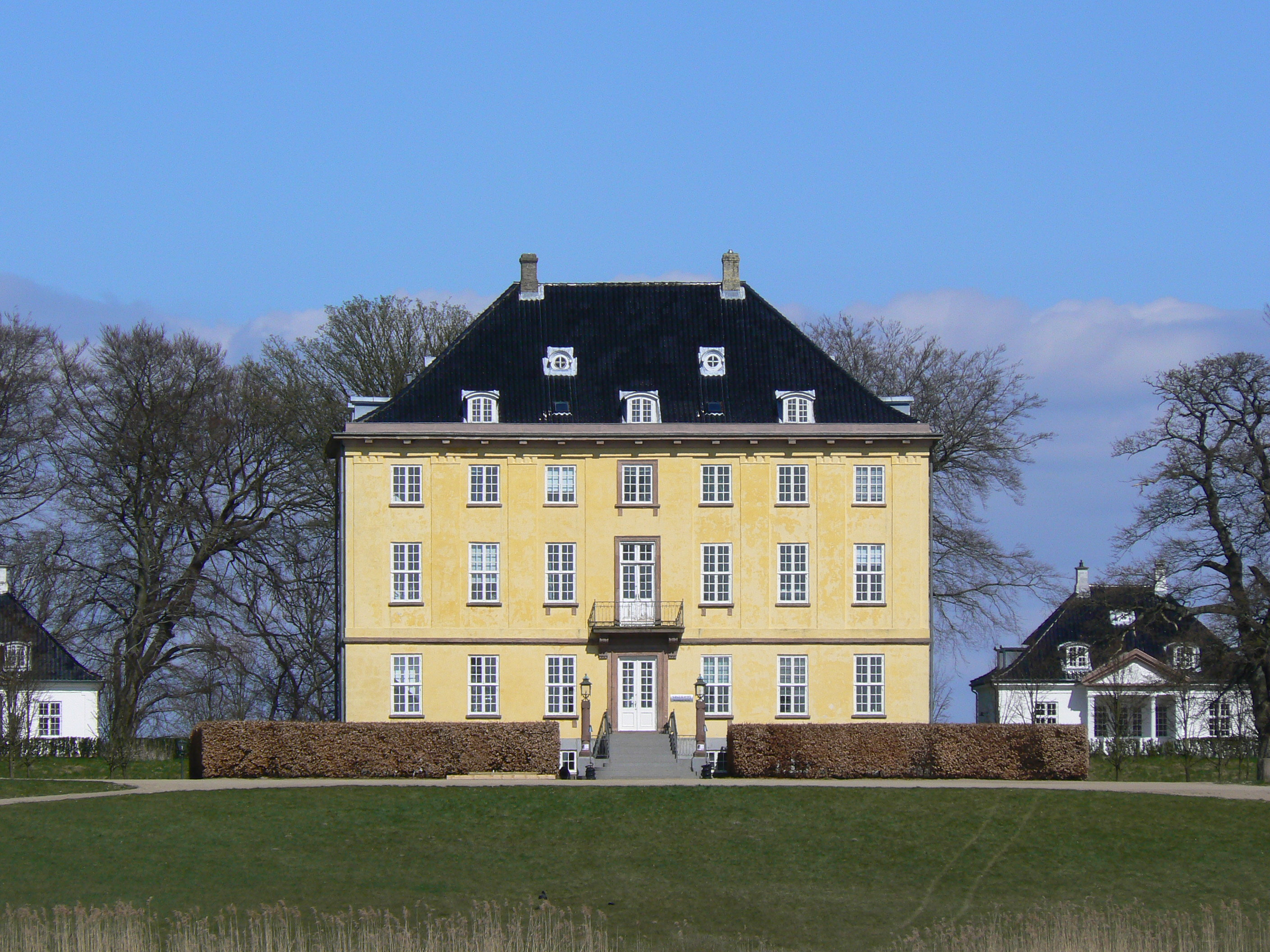 Næsseslottet at Furesøen north of Copenhagen, Denmark